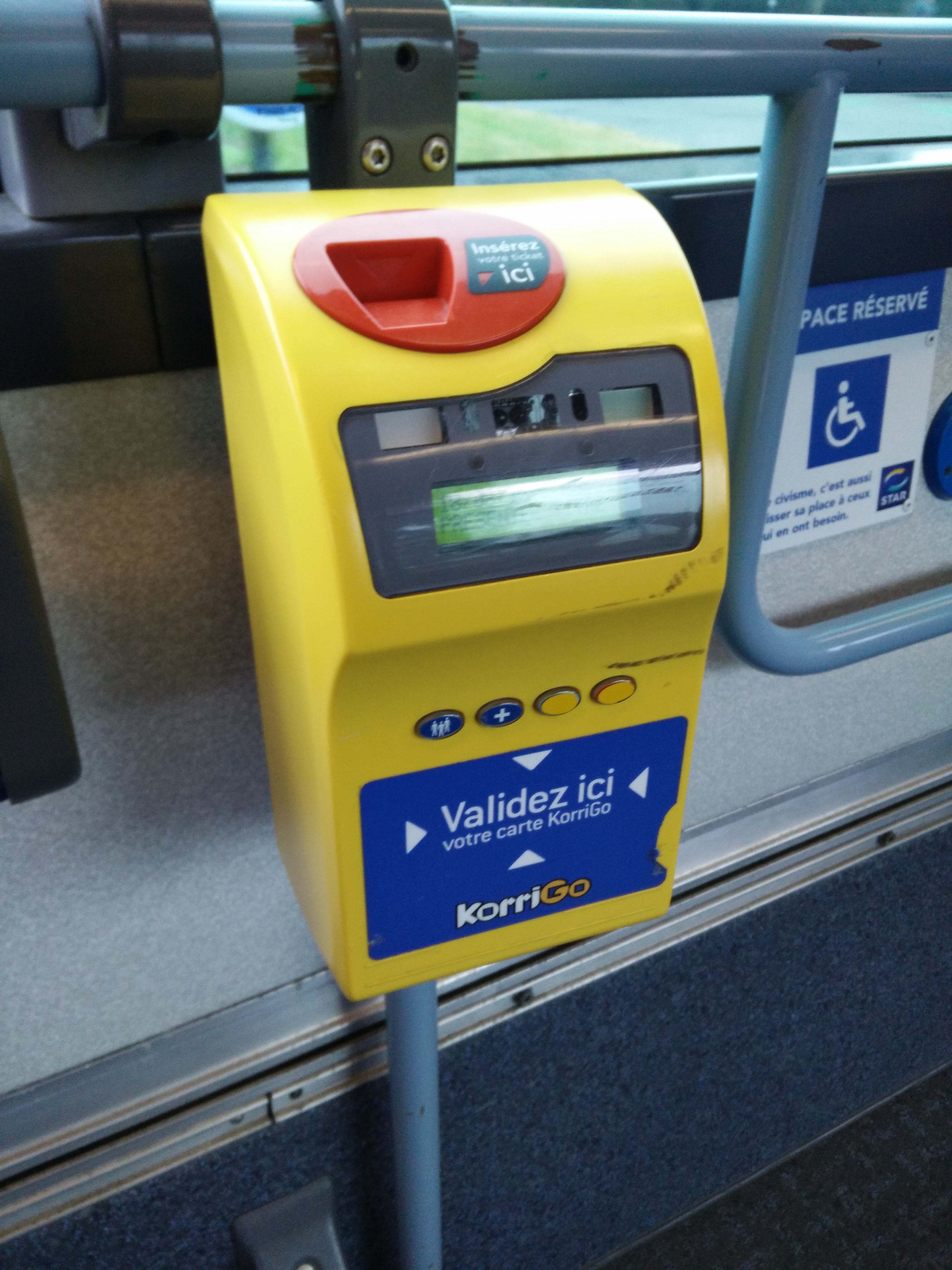 Borne de validation de titre de transport utilisé au sein du réseau de la STAR (ticket et carte Korrigo)